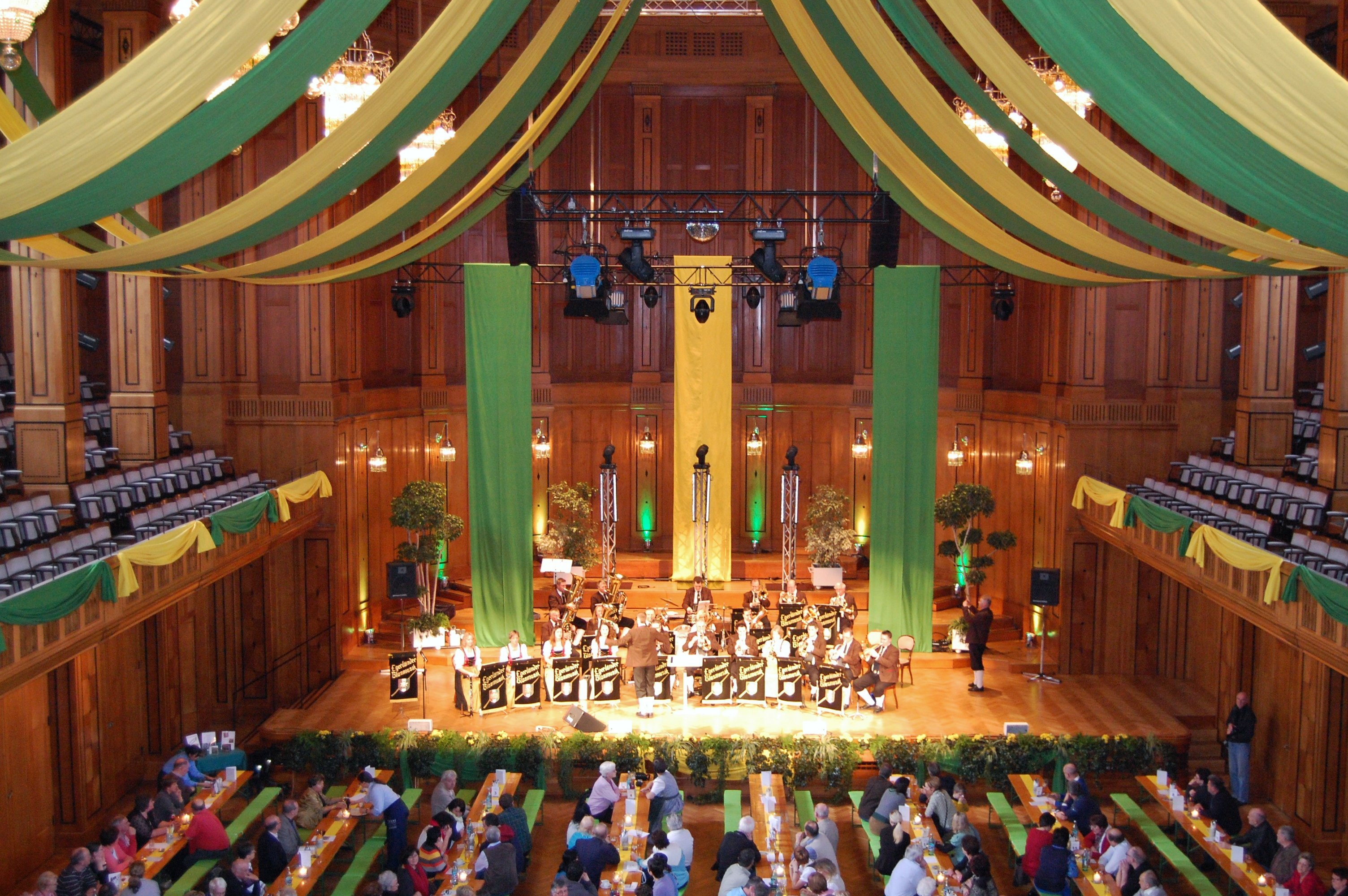 Der Max-Littmann-Saal im Bad Kissinger Regentenbau in Volksfest-Dekoration mit Biertischen im Parkett